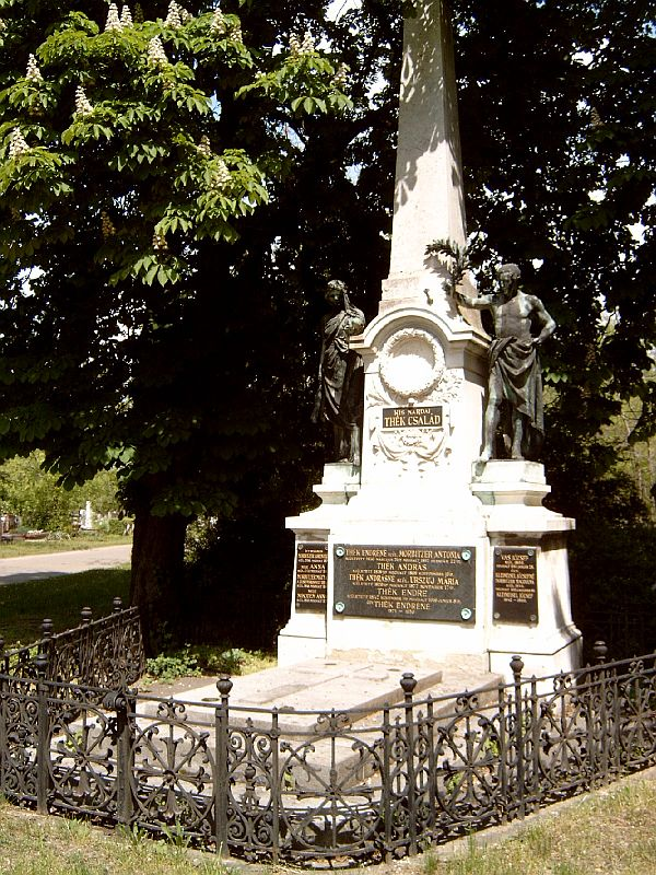 Thék Endre (Orosháza, 1842. nov. 1. – Bp., 1919. jún. 8.) nagyiparos, a nagyüzemi magyar bútorgyártás megteremtőjének sírja Budapesten. Új köztemető: 30-körönd-1.